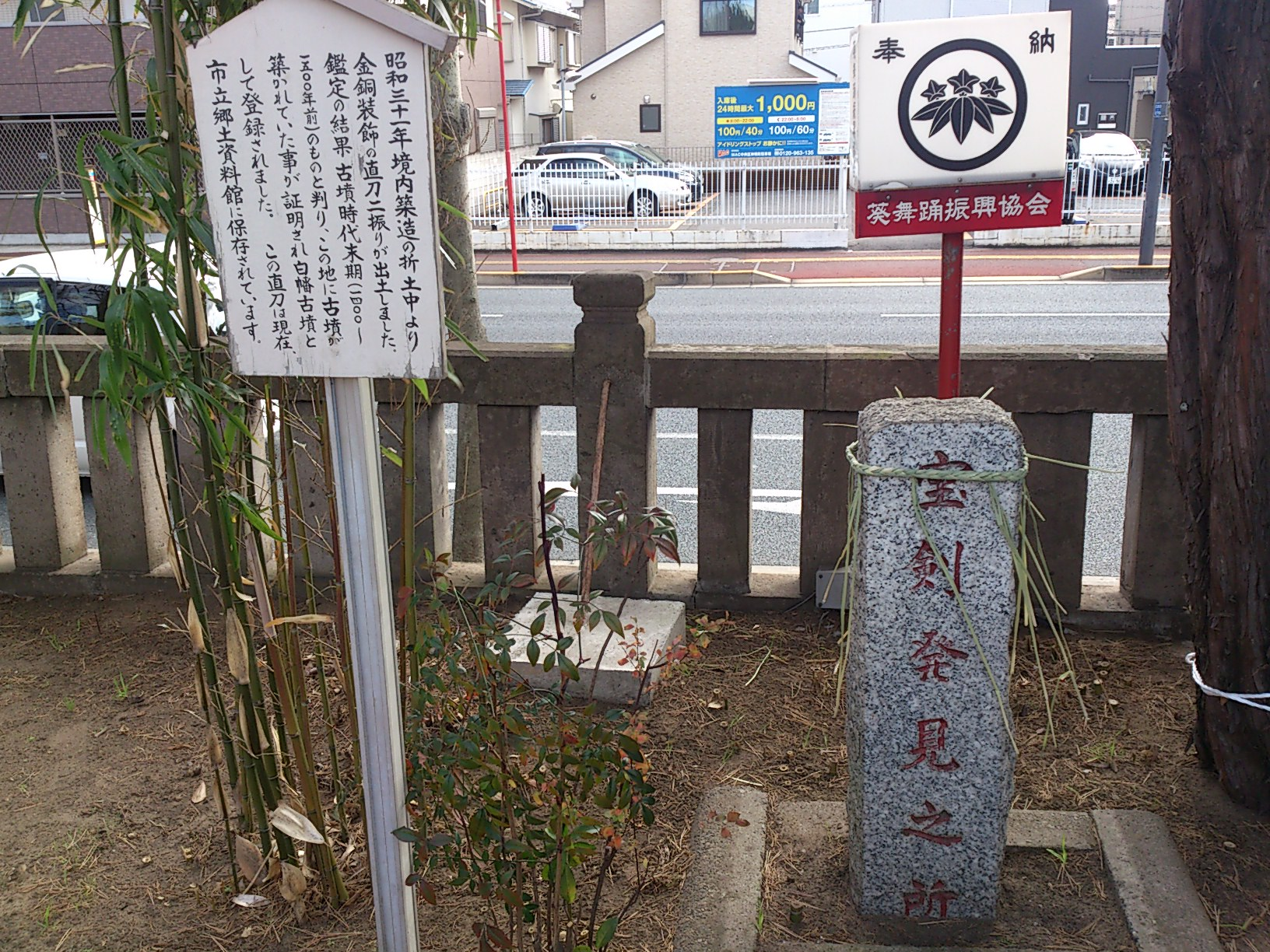 宝剣発見之所碑